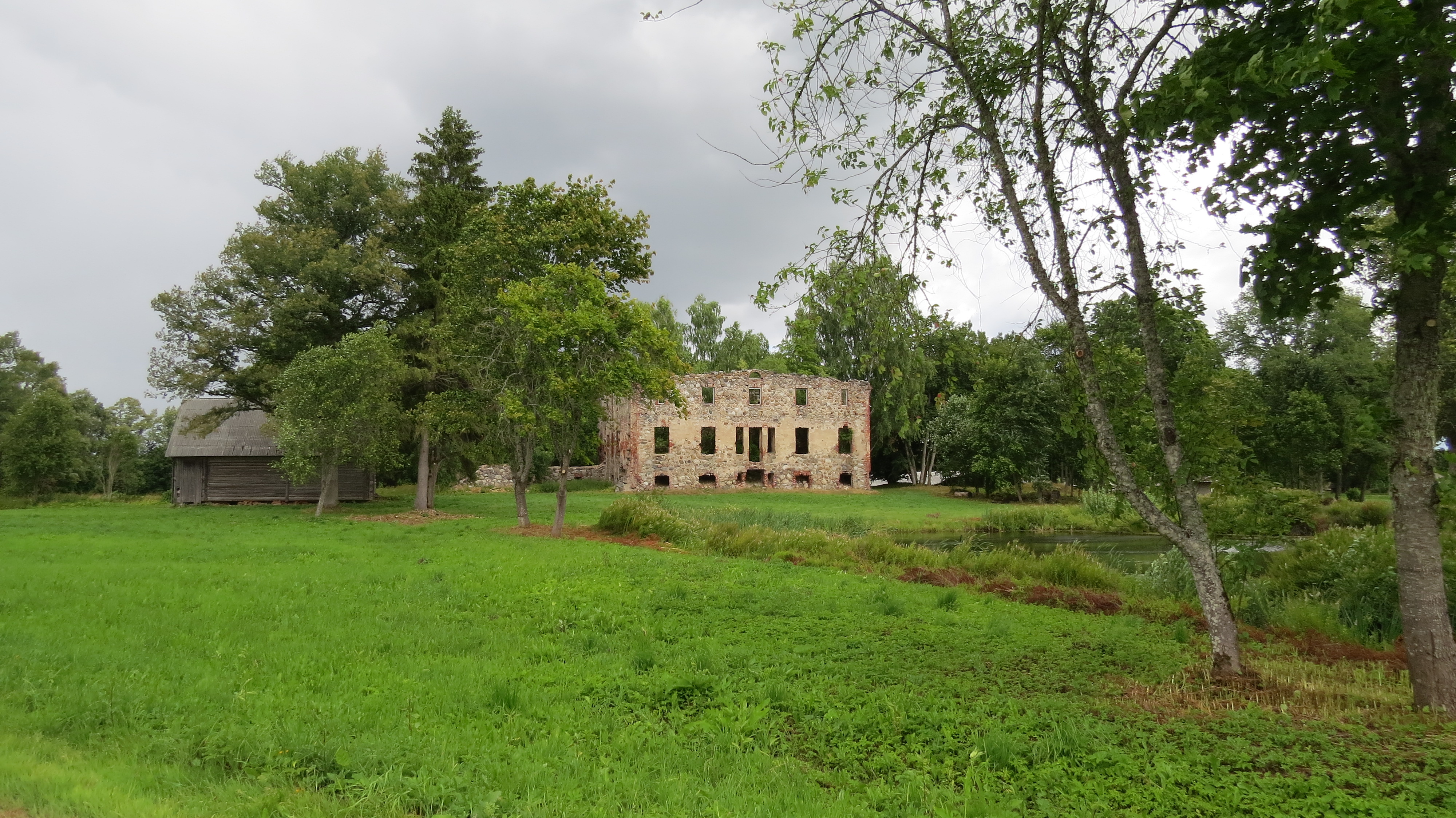 Pantene mõisasüda 2013. aastal.